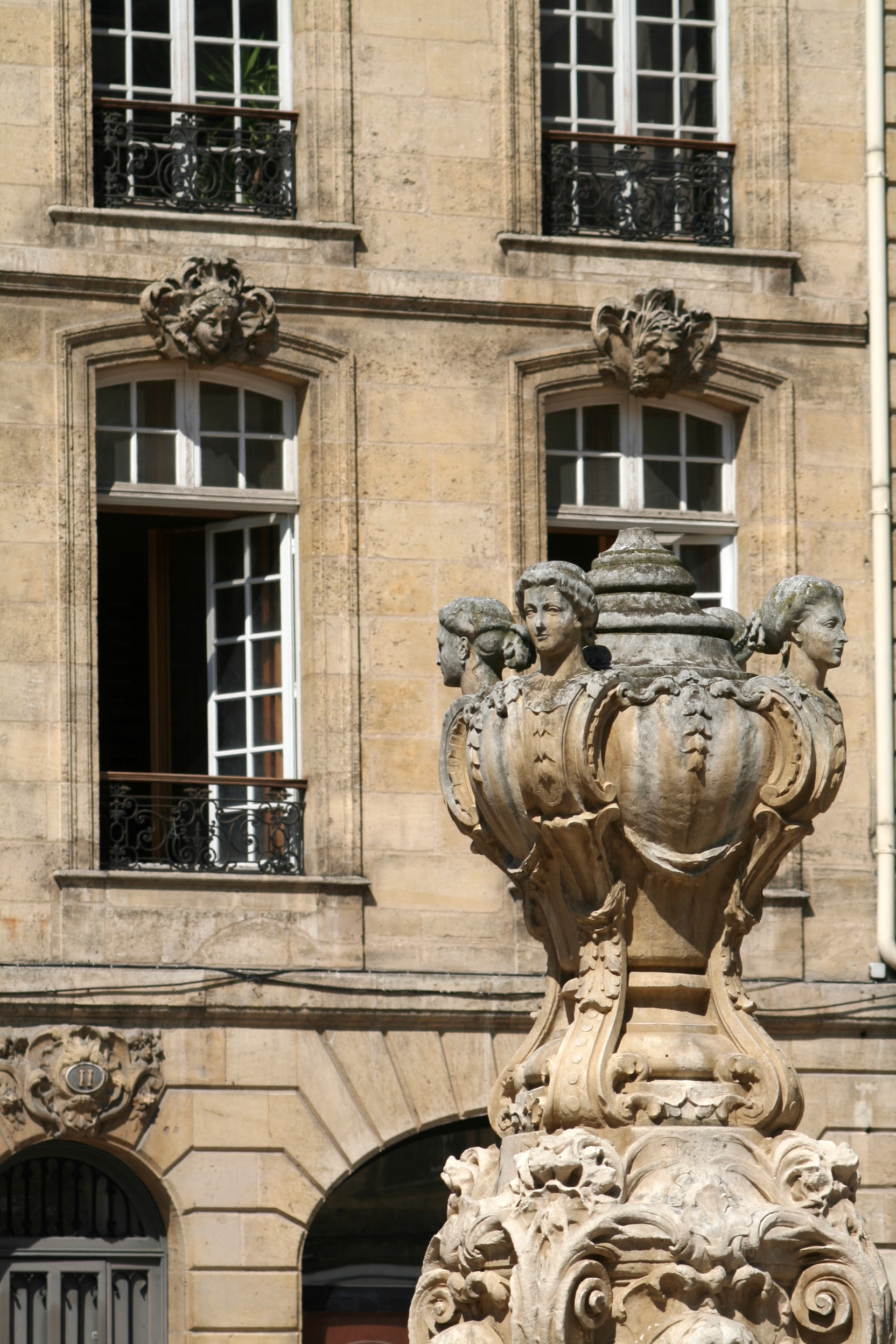 Place du Parlement, Bordeaux (33) 18th century date QS:P,+1750-00-00T00:00:00Z/7 Second Empire Fountain, Louis-Michel Garros, 1865